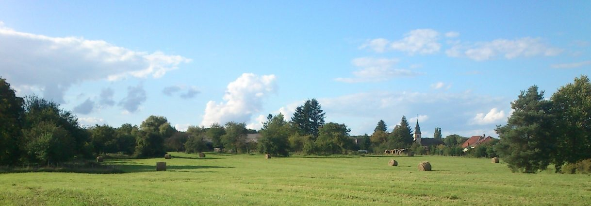 Vu sud la résie st martin